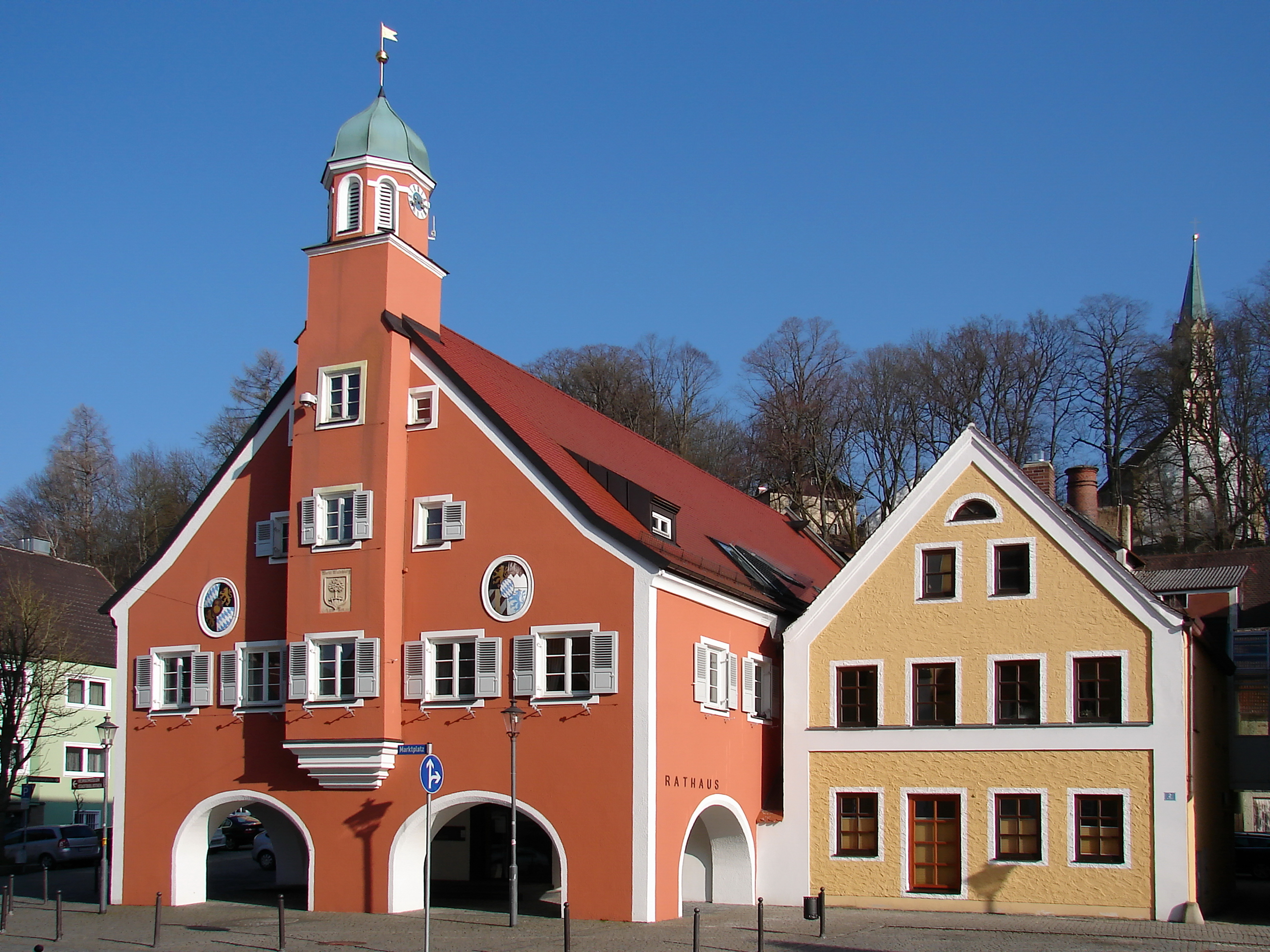 Mainburger Rathaus am Marktplatz